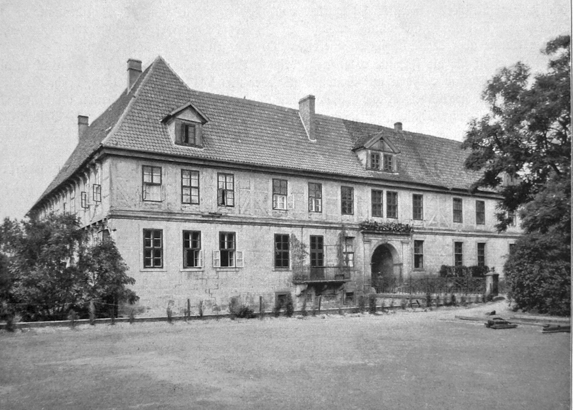 Rittergut Großgoltern, Herrenhaus, davor der Wassergraben, links der Südflügel